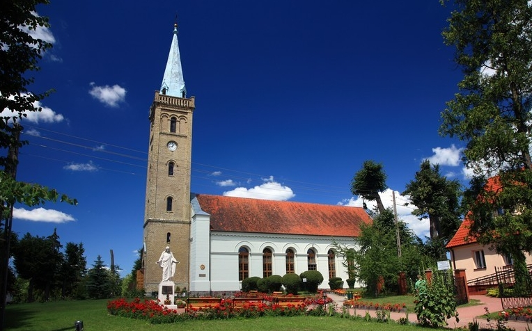 Mikołajki - miasto w woj. warmińsko-mazurskim, w powiecie mrągowskim